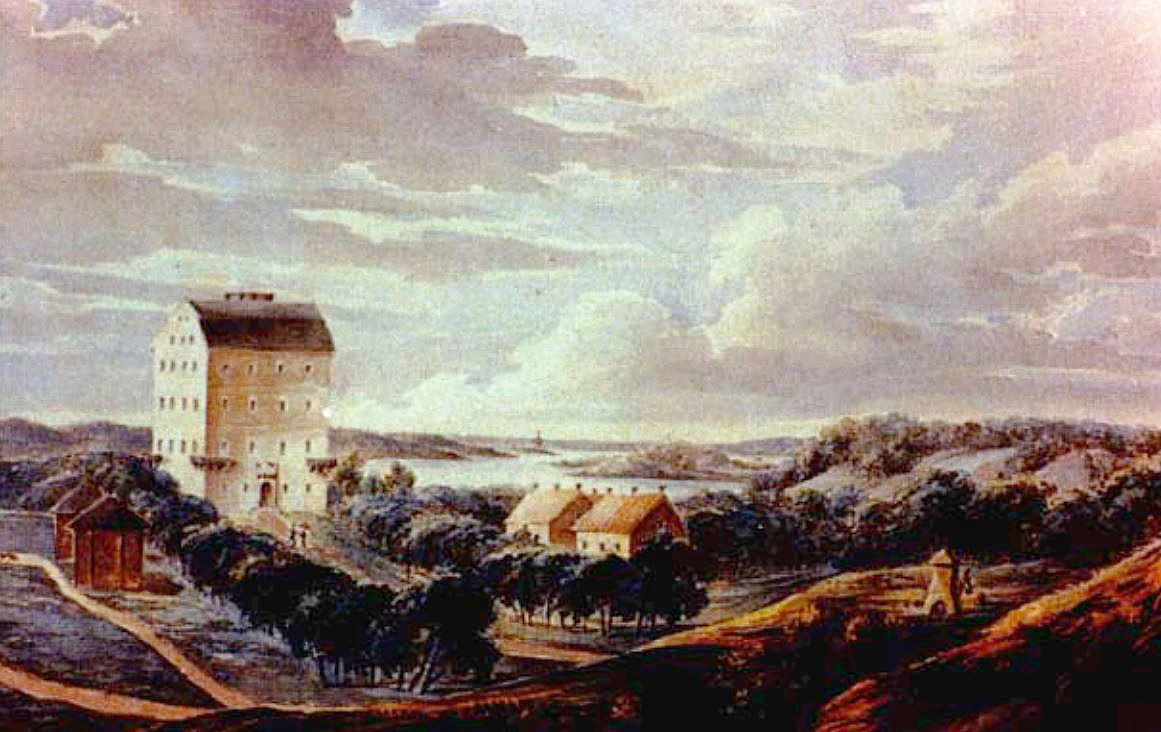 Bogesunds slott med omgivning. Slottet avbildas med nytillkomna balkonger som löper över andra våningens hörn. Spår efter dessa kan eventuellt vara igenmurade bjälkhål som iakttogs i murverket 2010-2011.